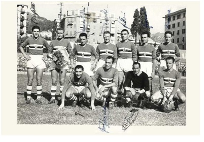 Foto di squadra della Sampdoria, 1946 circa.